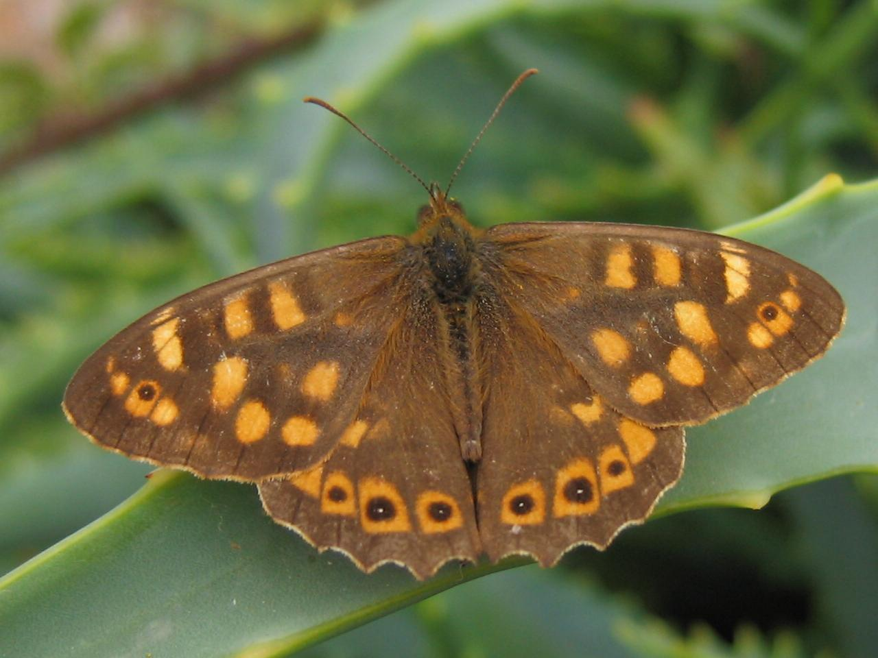 Pararge xiphioides, Anaga-Gebirge, Teneriffa